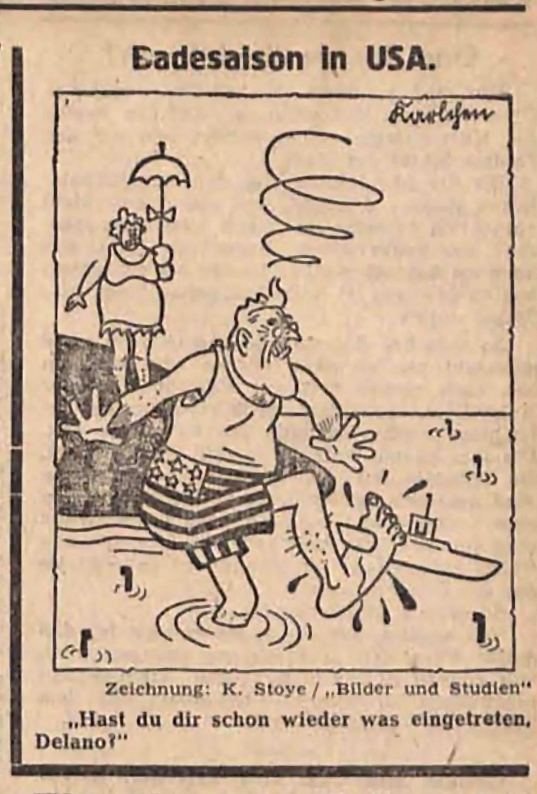 Karikatur in der deutschen Kriegspropaganda: Der US-Präsident Franklin Delano Roosevelt als "Opfer" des deutschen U-Boot-Kriegs (Zeichner: Karl Stoye, 1896–1947)